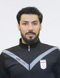 تصاویر مرحله دوم کلاس مربیگری B آسیا در تهران به مدرسی امیر حسین پیروانی با حضور ستارگان سابق فوتبال مثل تیموریان، جباری، حیدری،‌عمران‌زاده، بیک‌زاده و بنگر